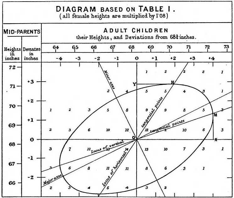 Diagramme de corrélation créé par Francis Galton en 1875